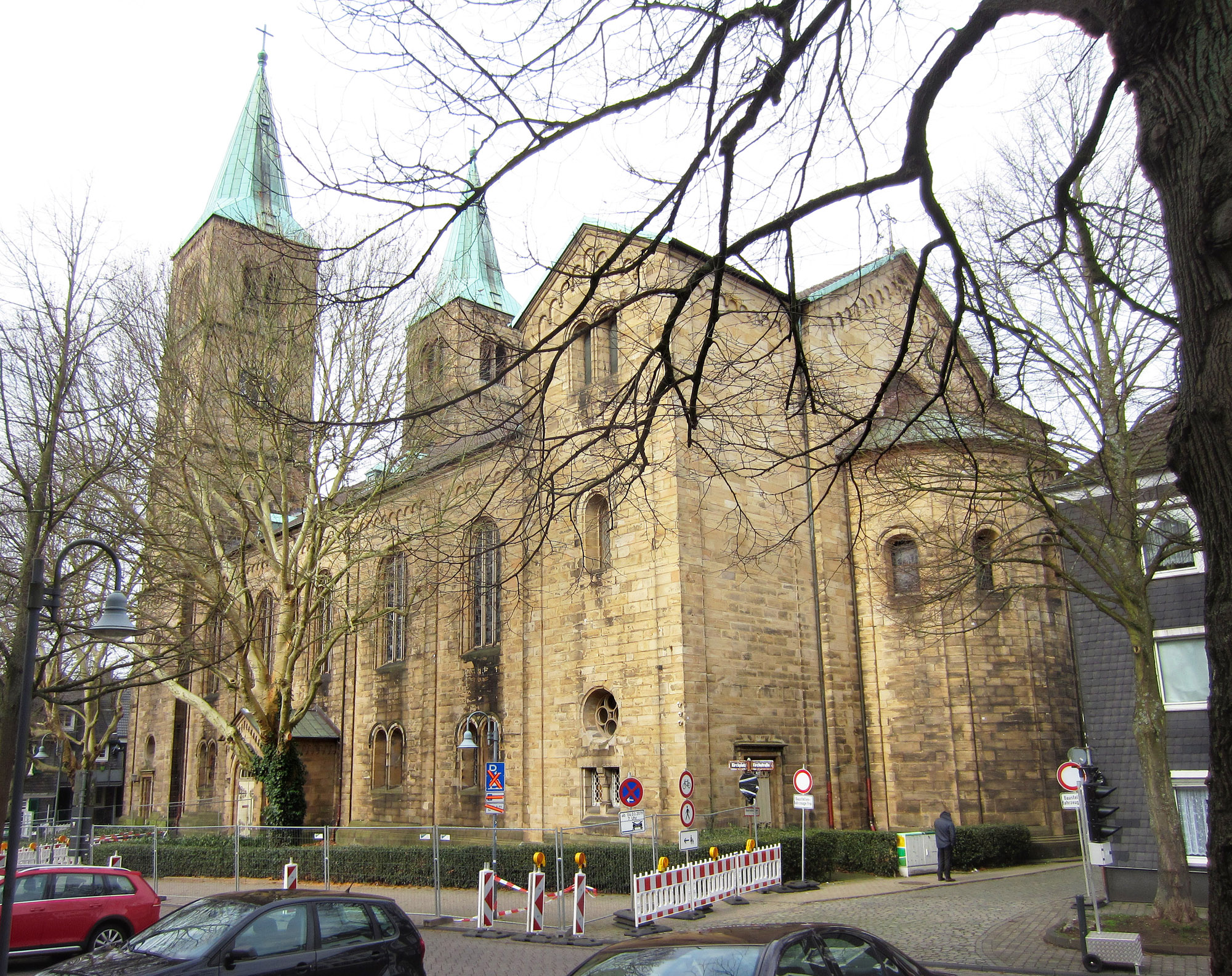 Baudenkmal Kirchplatz 9, Christuskirche Schwelm. Blick von Südosten